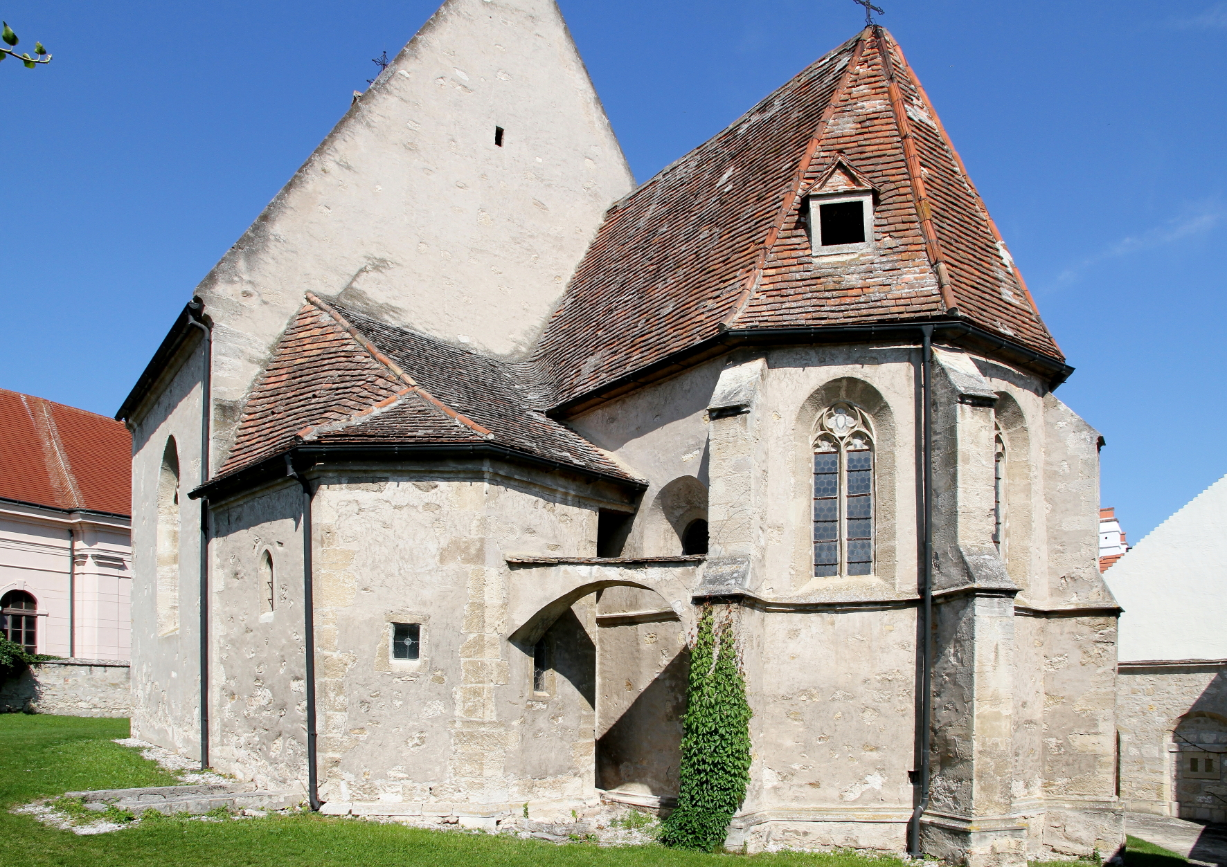 Die Südostansicht der Fischerkirche in der burgenländischen Stadt Rust. Im Vordergrund der Pankratiuschor (um 1400) und links die Marienkapelle aus der zweiten Hälfte des 13. Jahrhunderts, gestiftet von der Königin Maria von Ungarn.